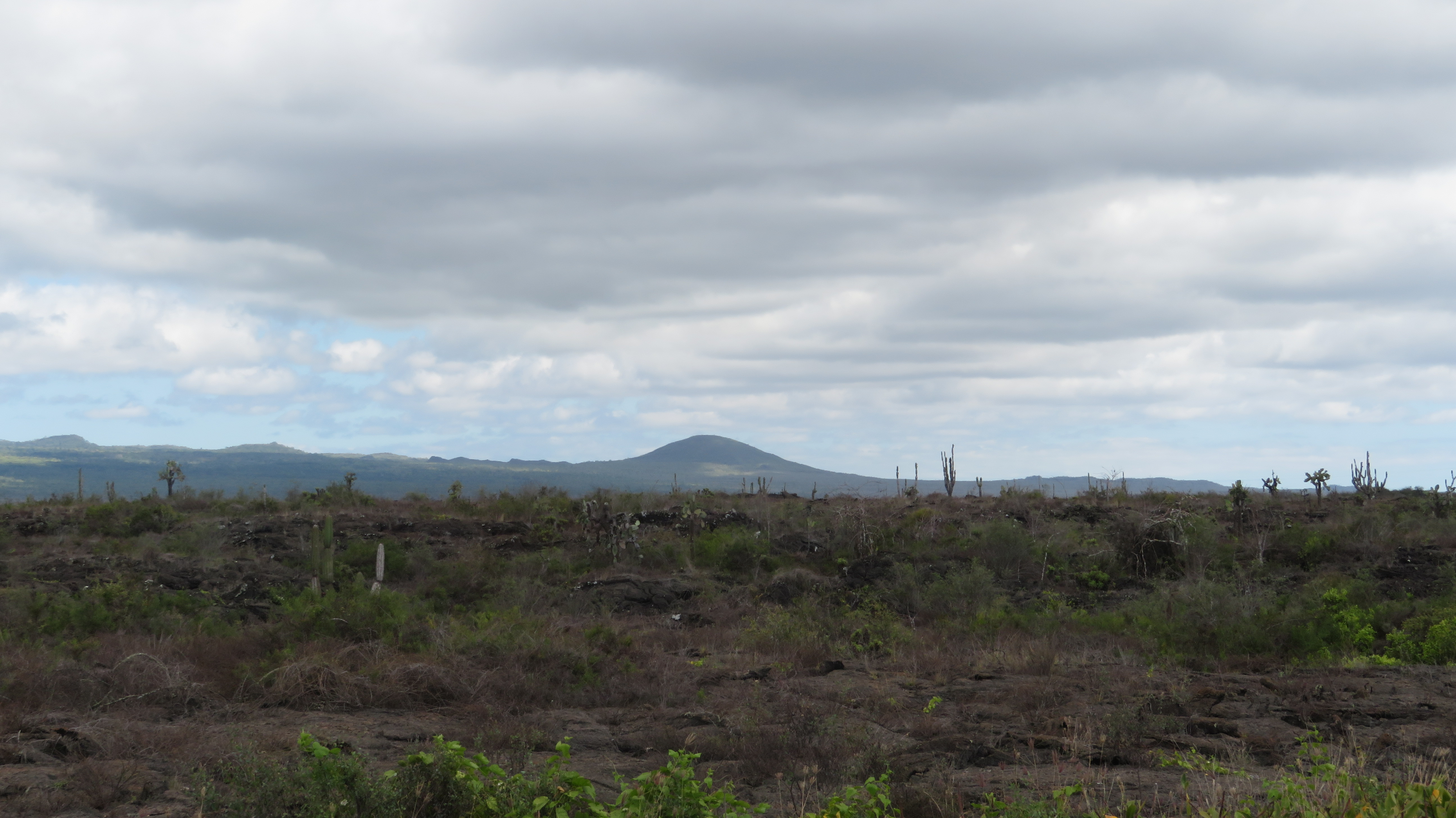 Vista de Puerto Villamil hacia el Volcán Chico, Isla Isabela, Islas Galápagos, Ecuador